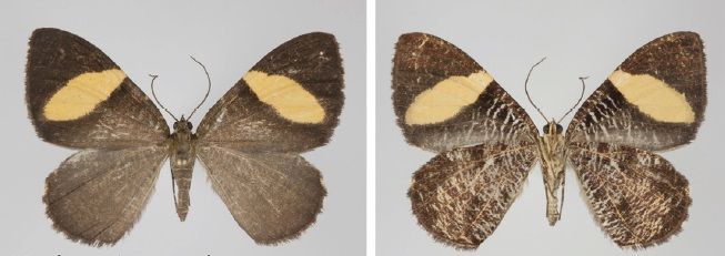 Hagnagora marionae